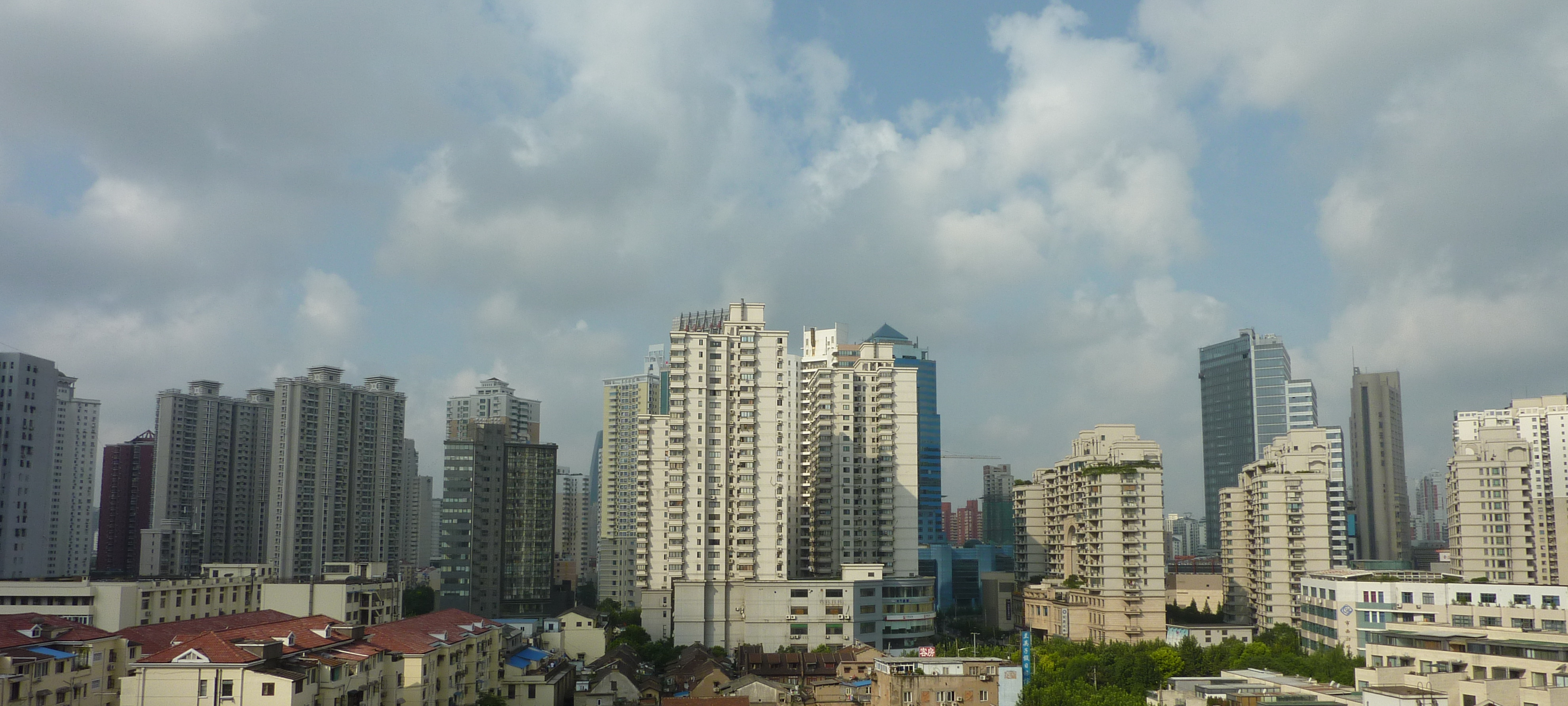 上海静安区曹家渡